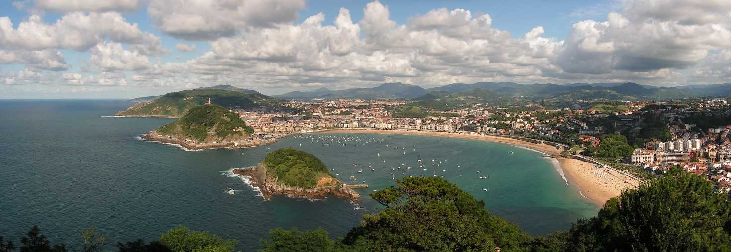 Baie de San Sebastien